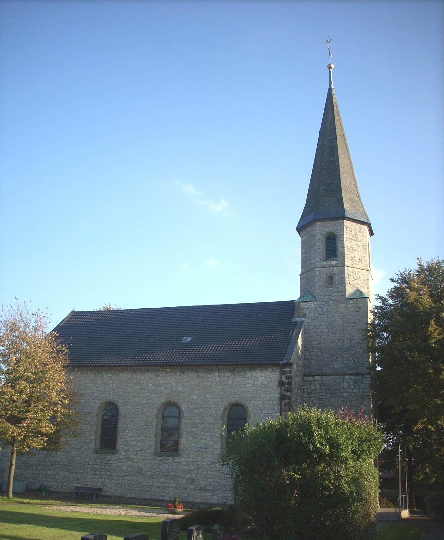 Machtsum (Harsum), Kath. Kirche St. Nikolaus